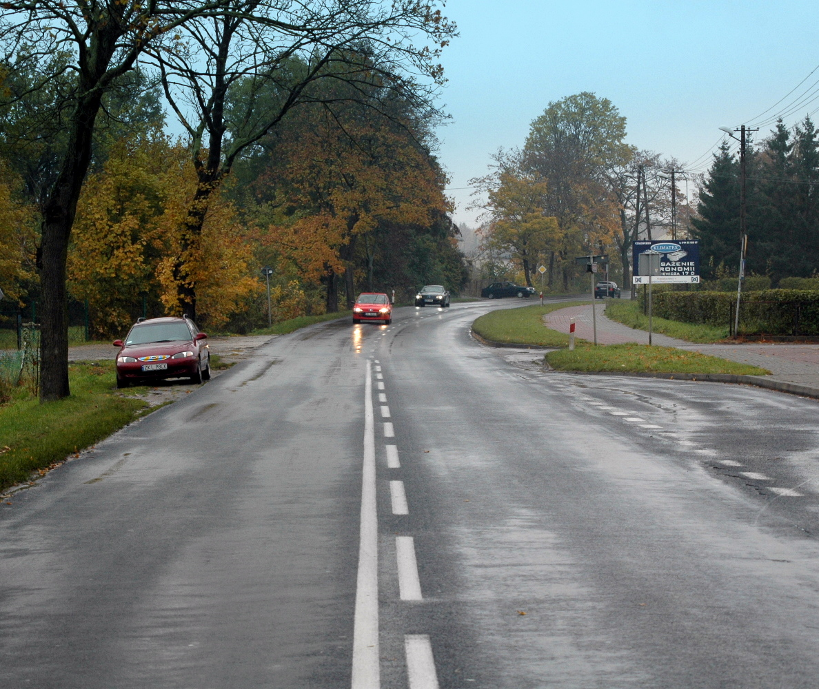 Droga wojewódzka nr 102 w Zieleniewie.